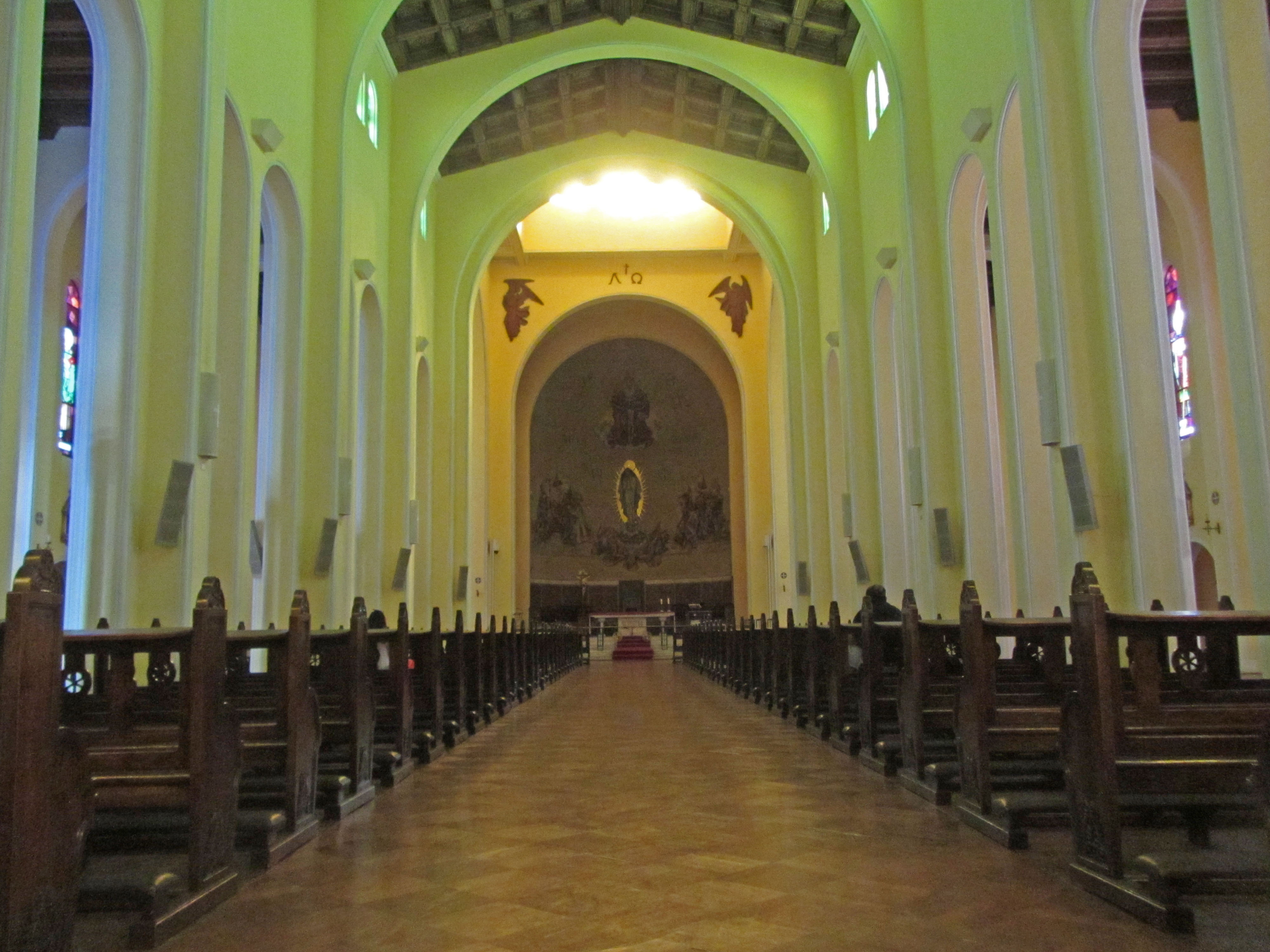 Interior de la Catedral de la Santísima Concepción Concepción, Chile